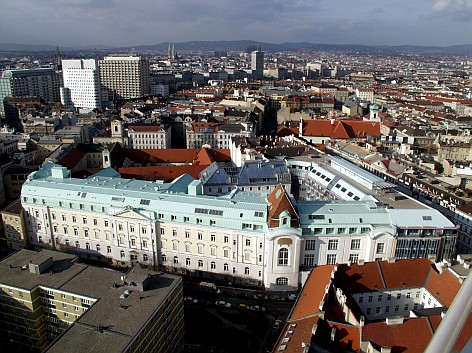 Aerial photo of the Hospital of St. John of God, Vienna